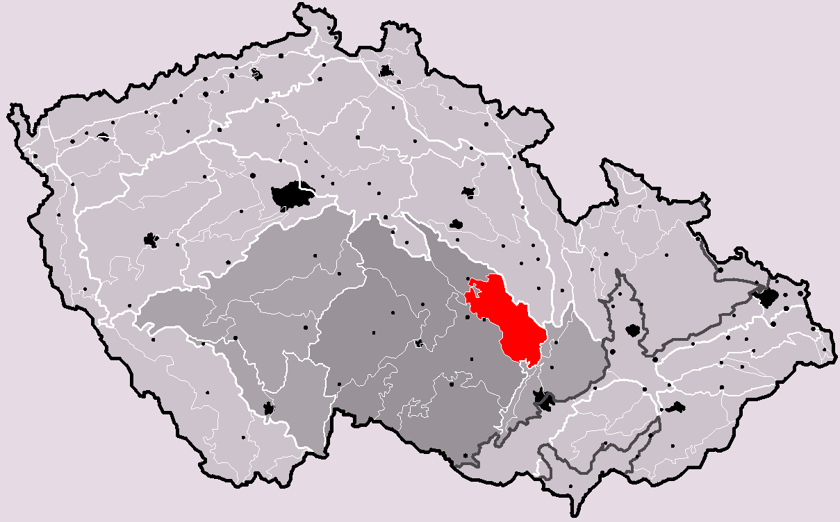 Poloha geomorfologického celku Hornosvratecká vrchovina v rámci České republiky. Hercynský systém Hercynská pohoří I Česká vysočina I2 (II) Česko-moravská subprovincie I2C (IIC) Českomoravská vrchovina I2C-4 (IIC-4) Hornosvratecká vrchovina